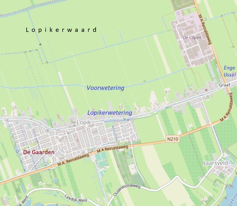 ontleend aan OSM